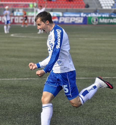 Сибирь - Ростов 2-0